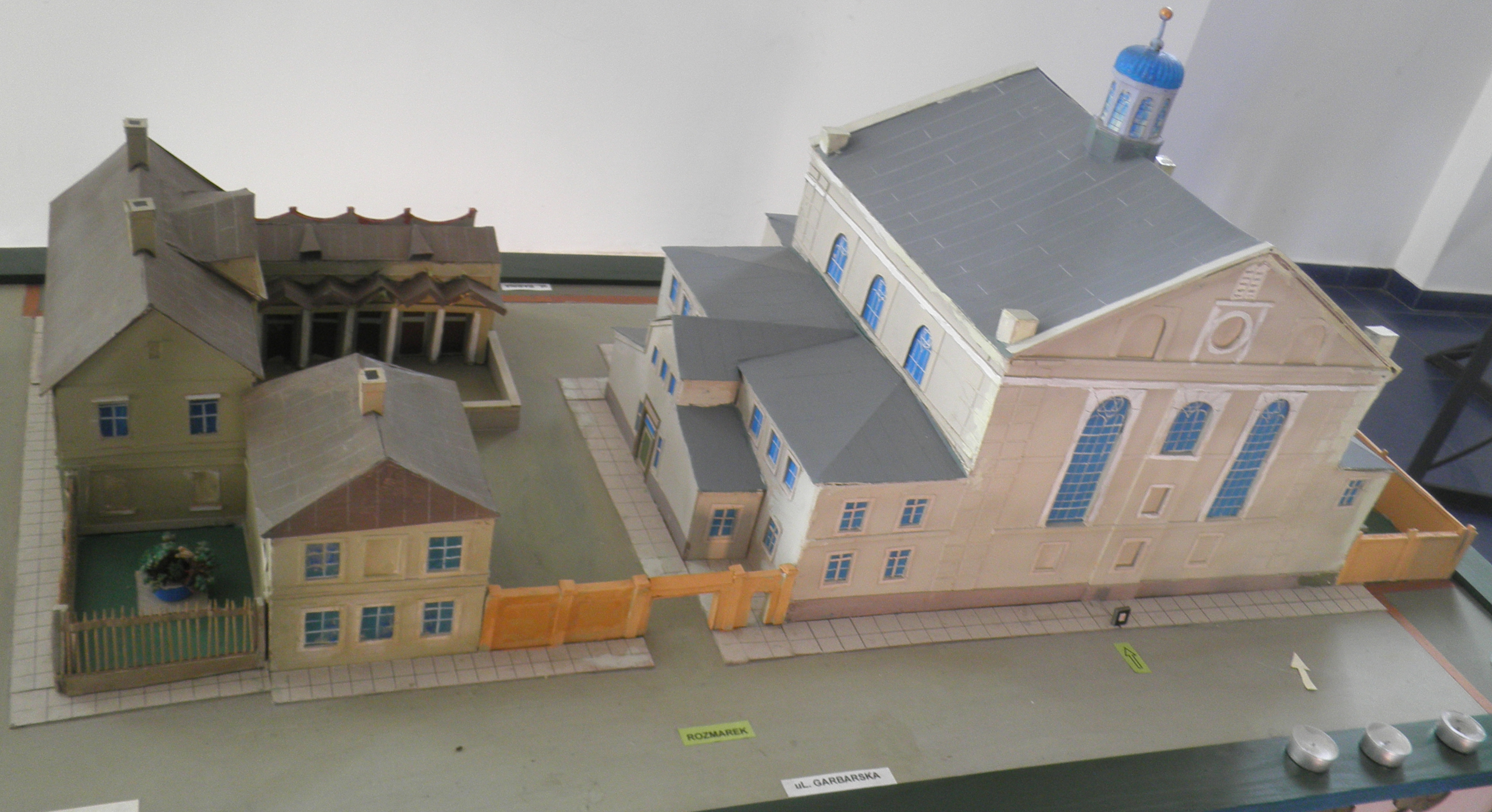 model synagogy města Kalisz